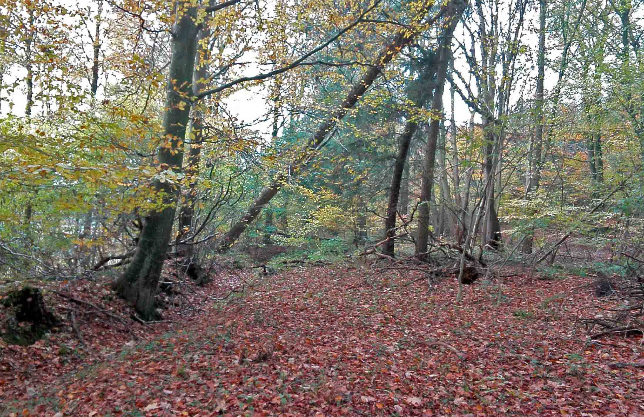 Haderslev Amtsbaners bevarede tracé i Pamhule Skov vest for skovvejen slutter